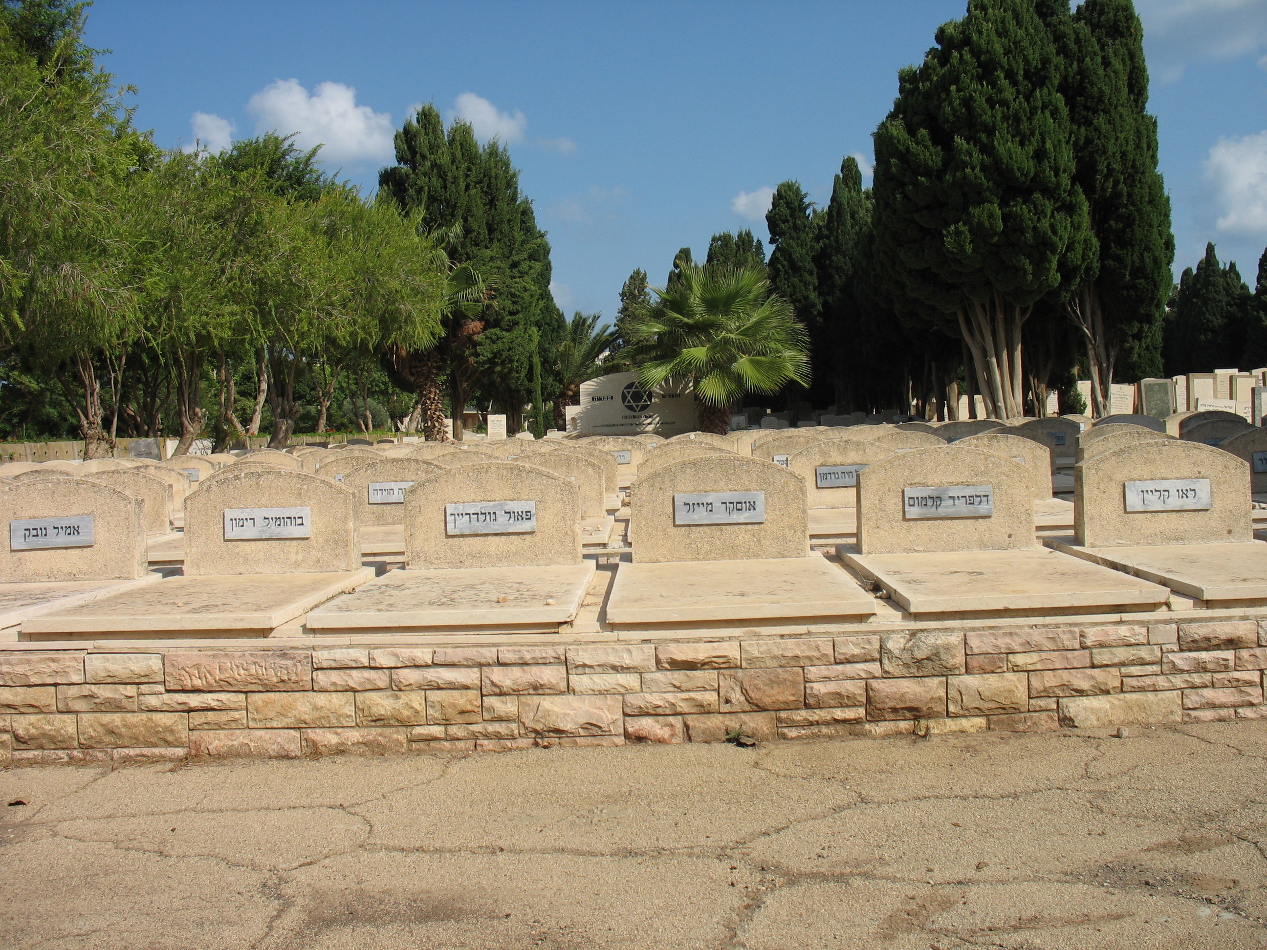 חלקת חללי מעפילי פאטריה